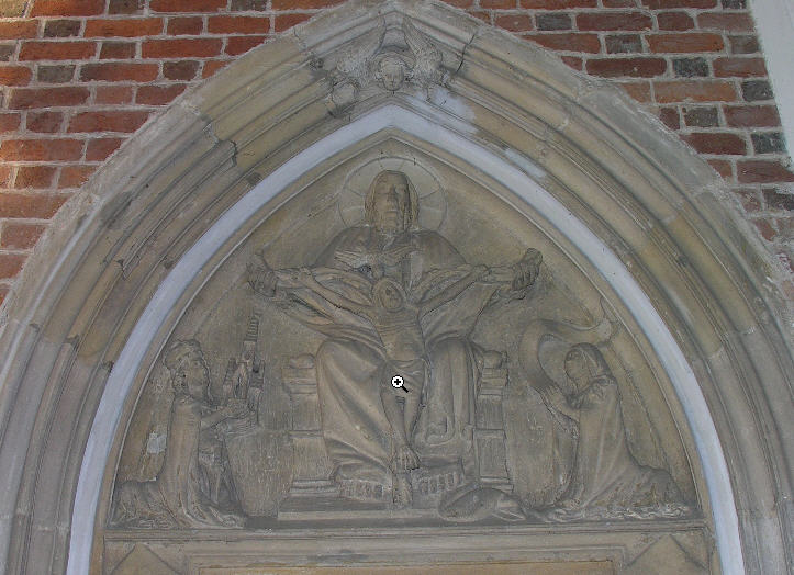 Jindřich IV. Probus a Mechtilda